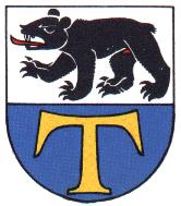 Gemeindewappen Teufen